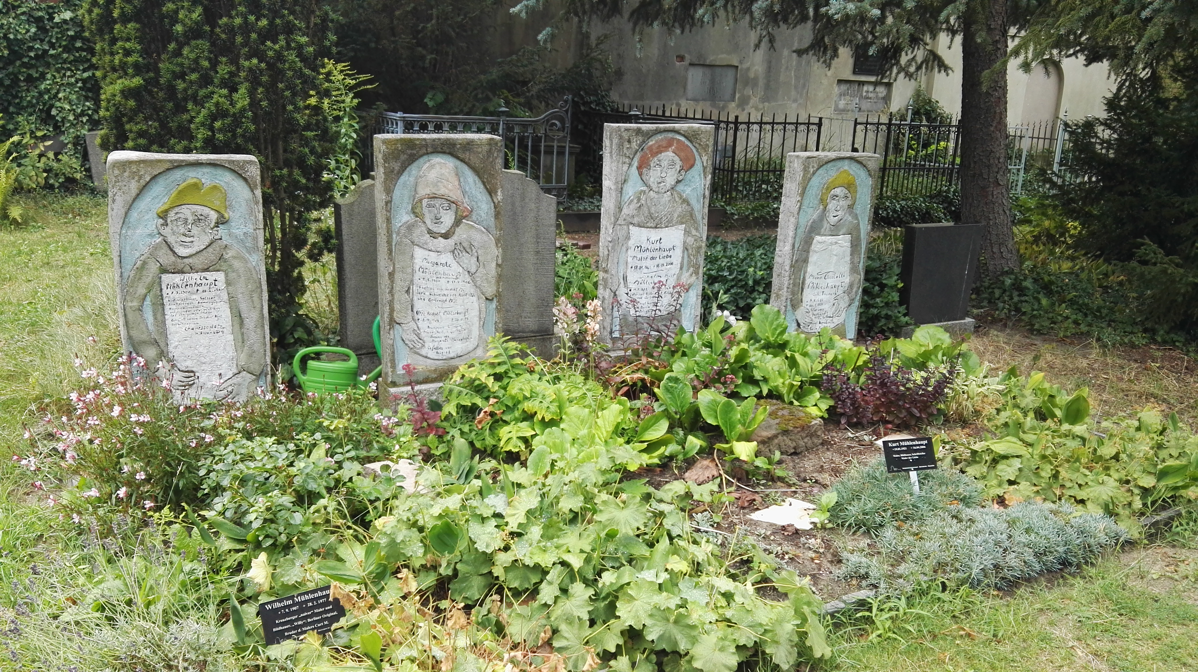 von Kurt Mühlenhaupt gestaltete Grabsteine für sich, seinen Bruder Wilhelm Mühlenhaupt und seine Schwester Margarete Mühlenhaupt, Friedhof der Bethlehems- und Böhmischen Gemeinde